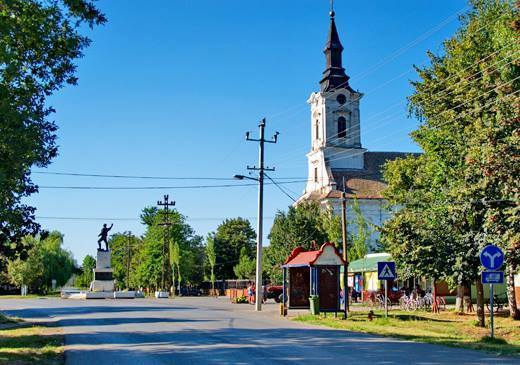 Centar sela Kumane